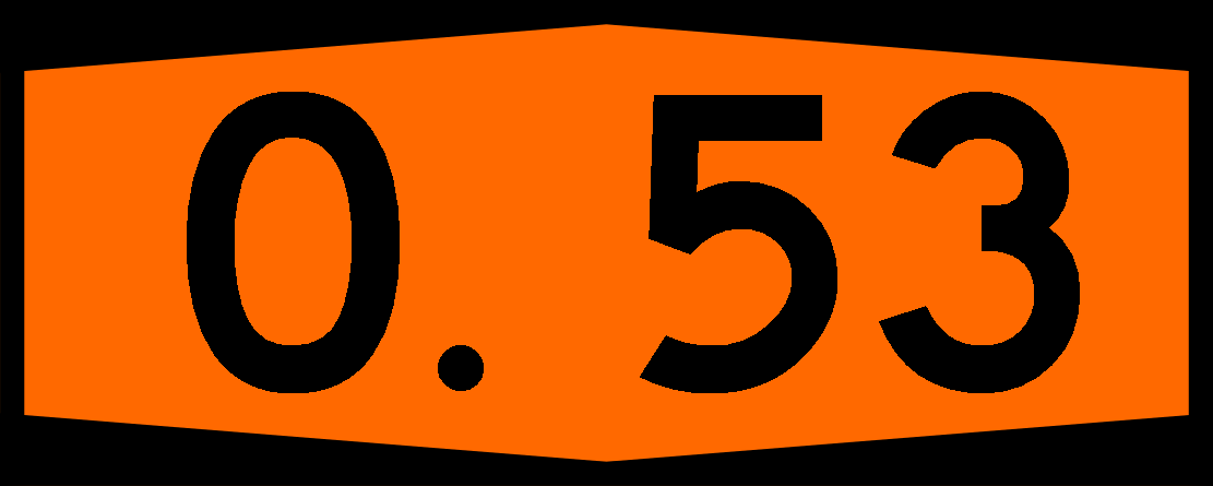 Otoyolu 53